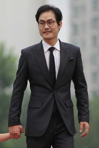 제19회 부천국제판타스틱영화제 폐막식 레드카펫